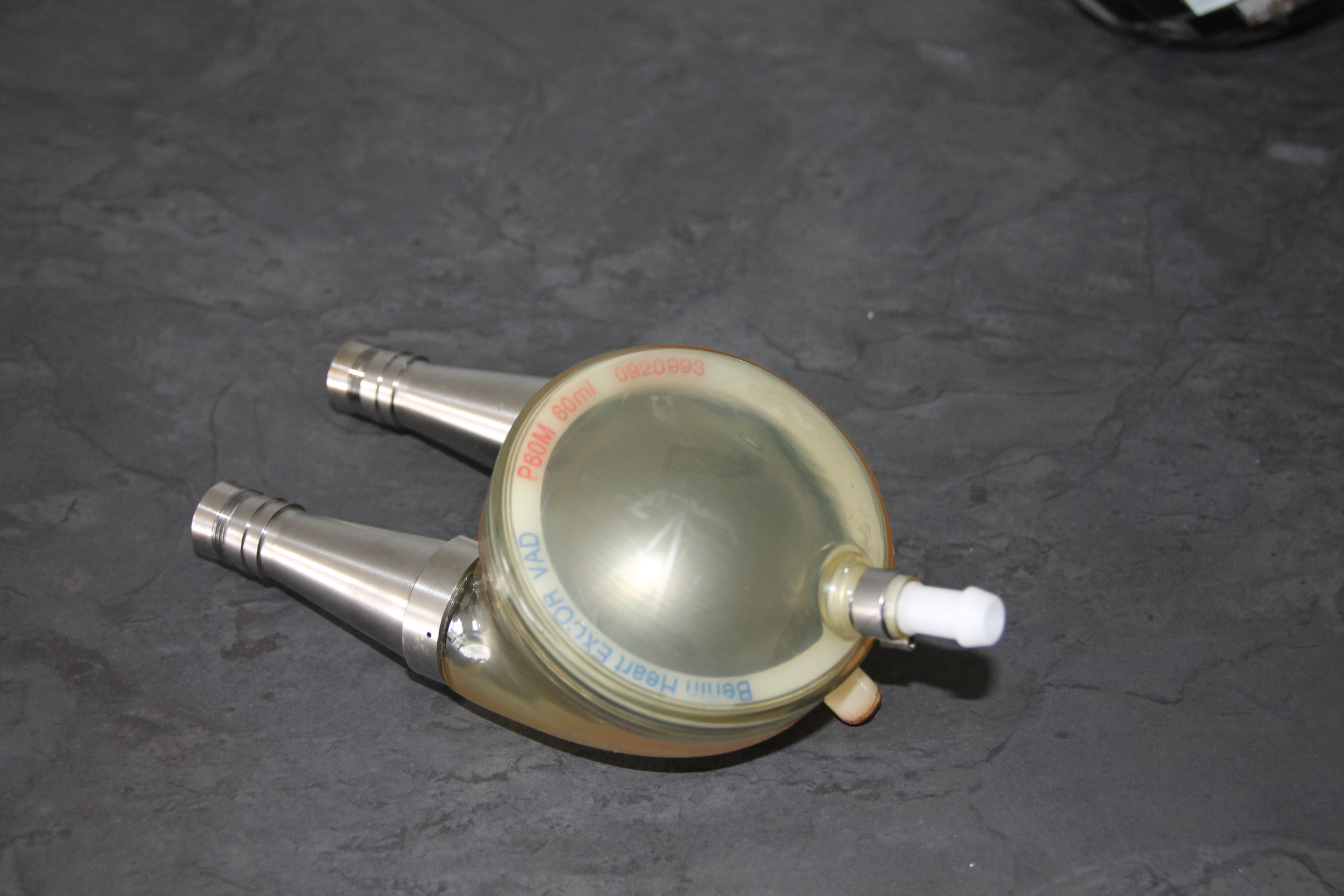 Het hartje dat zorgt voor de bloedcirculatie wanneer men aangesloten is op een kunsthart type 'Excor'.